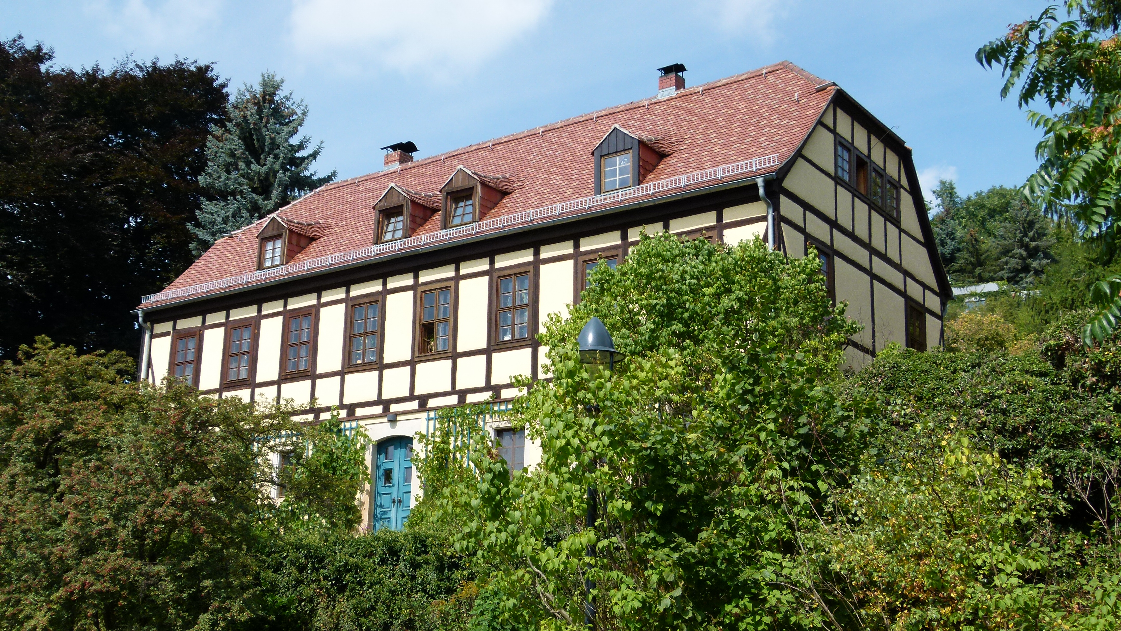 Denkmalgeschütztes Haus, Obere Bergstraße 44, Radebeul, Sachsen